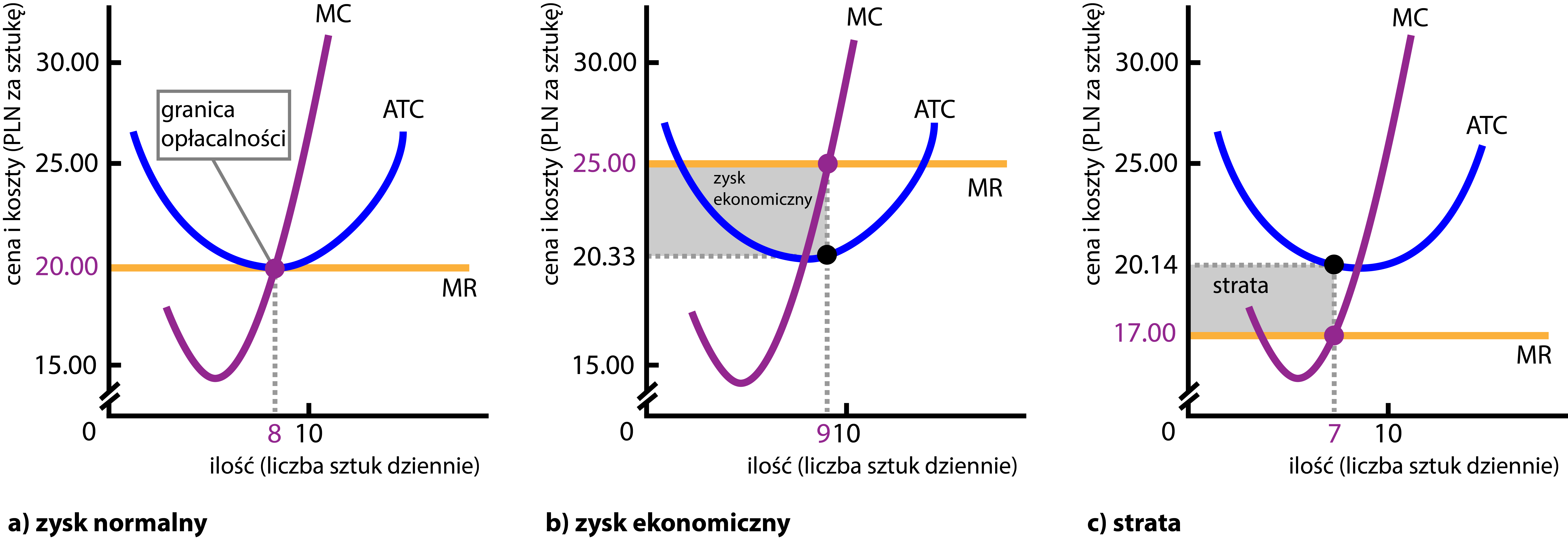 Funkcjonowanie przedsiębiostwa doskonale konkurencyjnego w krótkim okresie